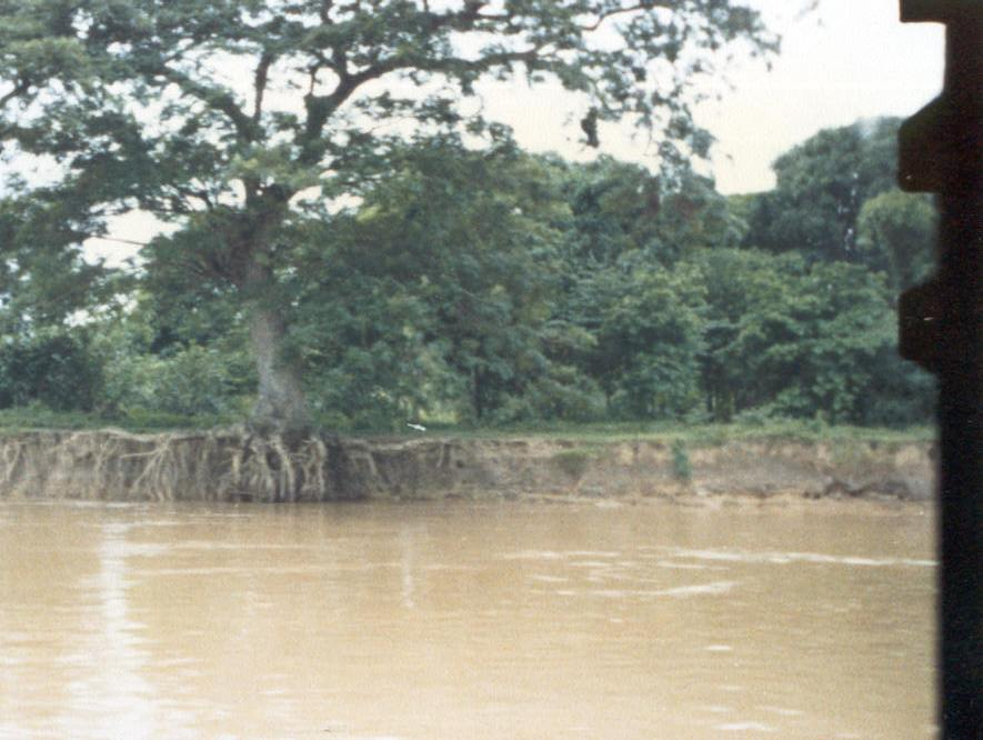 Ejemplo de la erosión en la orilla izquierda del río Apure. Dicha erosión es mucho mayor que en la orilla derecha, debido al efecto de Coriolis. Foto: Alberto J. Rodríguez Díaz, 1978. Con su autorización.